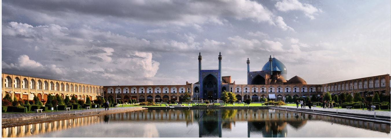 میدان